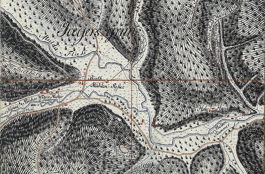 Darstellung der Kleinen Pyra in alten Kartenwerken. Ausschnitt aus Blatt 195 von 1791 der Sächsischen Meilenblätter in der Berliner Ausgabe. Digitalisat in der Sächsische Staats- und Universitätsbibliothek. Die Karte ist nicht nach Norden ausgerichtet. Die Kleine Pyra wird als „die Kleine Bühre“ bezeichnet. Zu sehen ist, wie sie mäandert und in Jägersgrün in die Zwickauer Mulde (bezeichnet als „der Mulda-Fluss“) mündet. Dargestellt ist auch der „Untere Hammer“ und als „zu Tannenbergsthal“ gehörend bezeichnet. Erkennbar ist auch der - sicher von der Kleinen Pyra gespeiste - Graben, dessen Wasserkraft sicher im "Unteren Hammer" genutzt wurde.